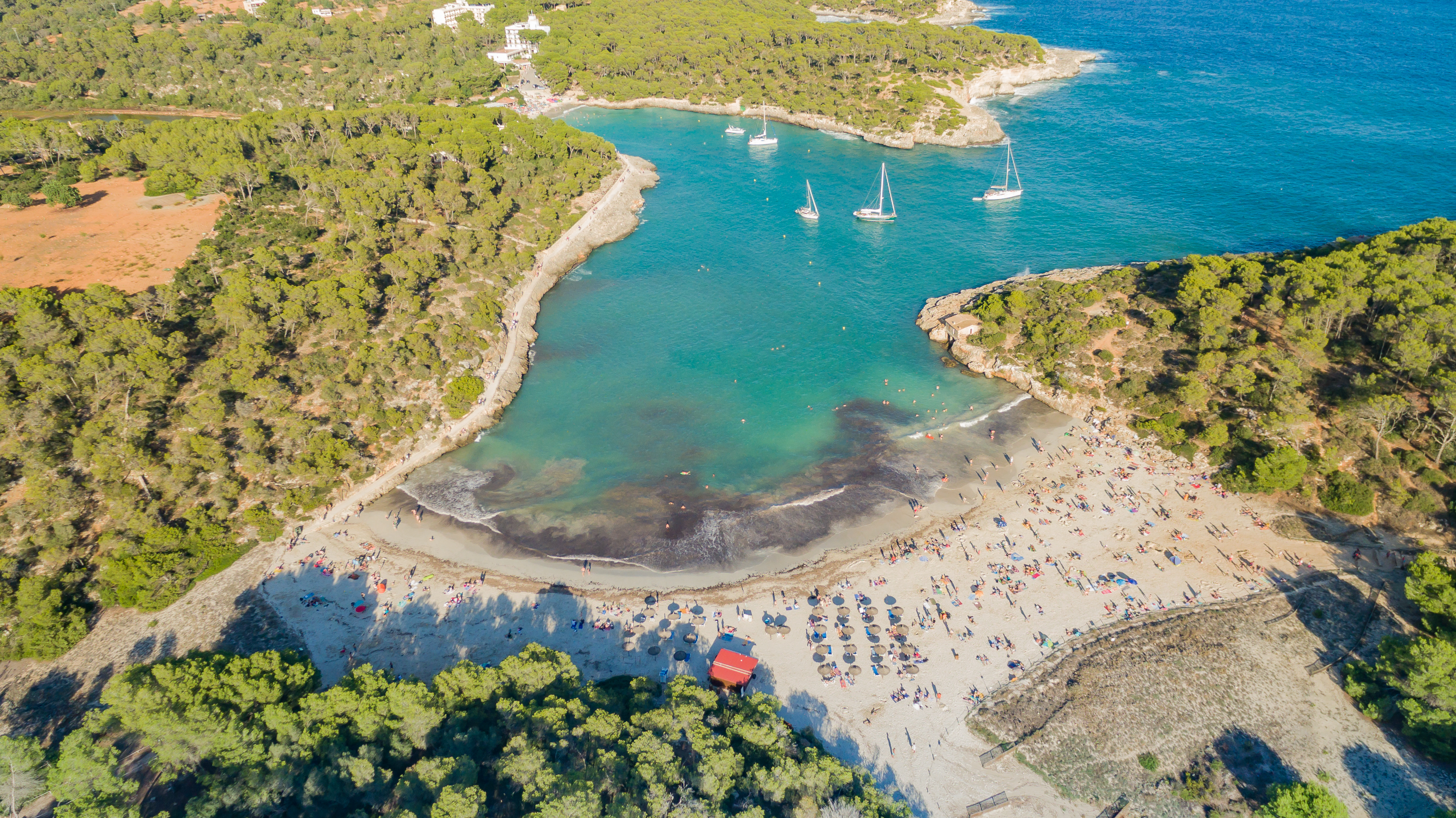 Mallorca schönste Strände Cala Amarador